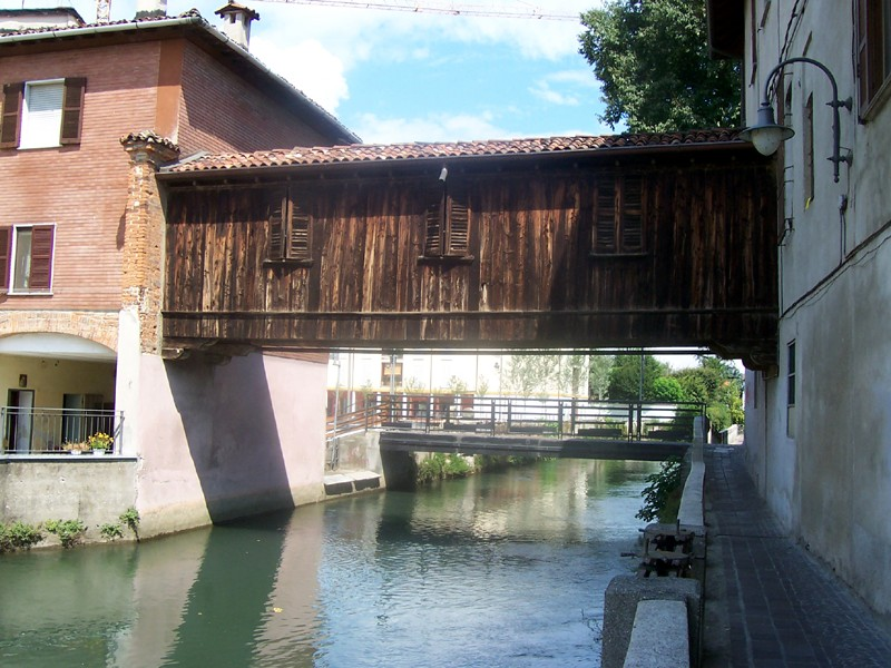 Gorgonzola - Casa ponte in legno sul Naviglio Martesana